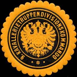 Sealing stamp Title: 9. Kavallerietruppendivisionskommando Description: gelb, schwarz, geprägt Place: size: 4 cm